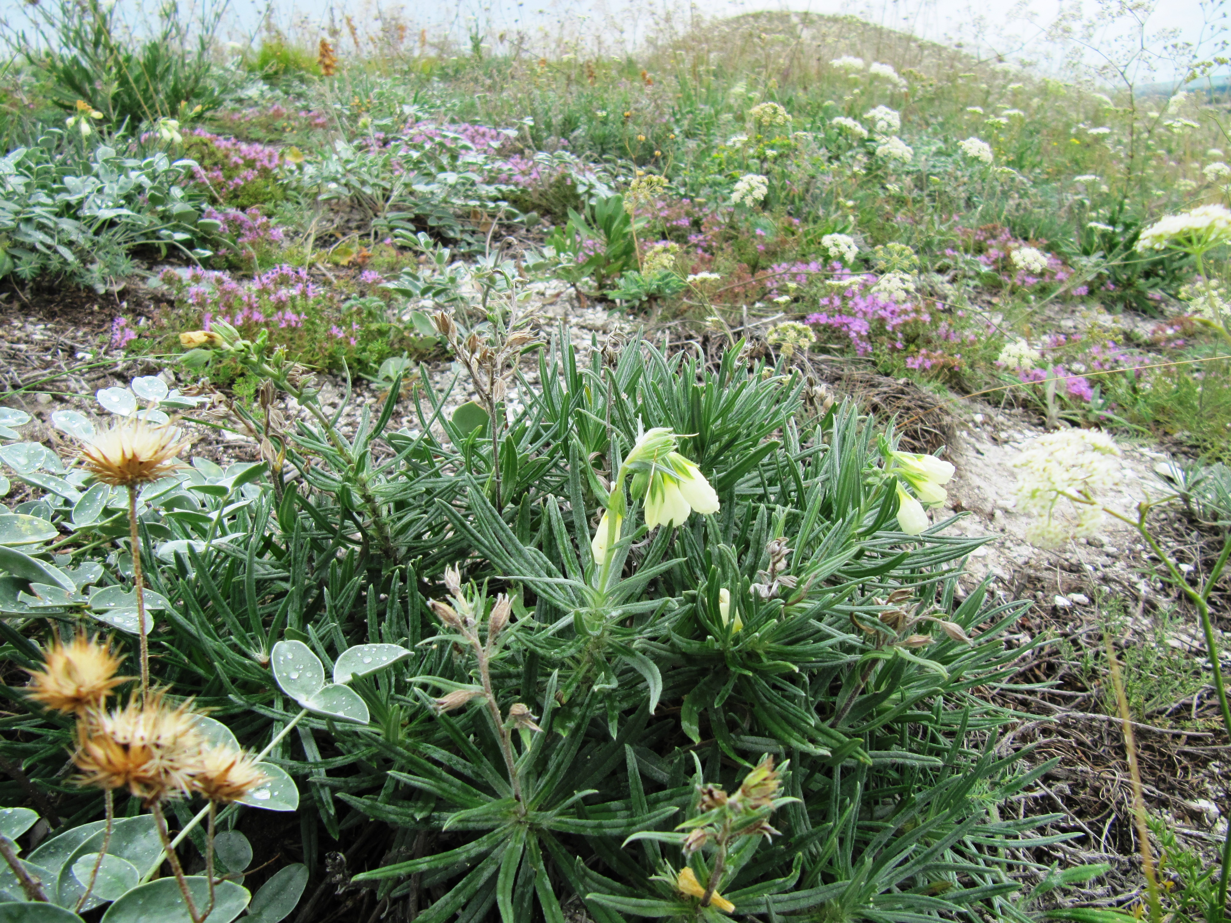 Разреженная растительная группировка на меловом склоне.